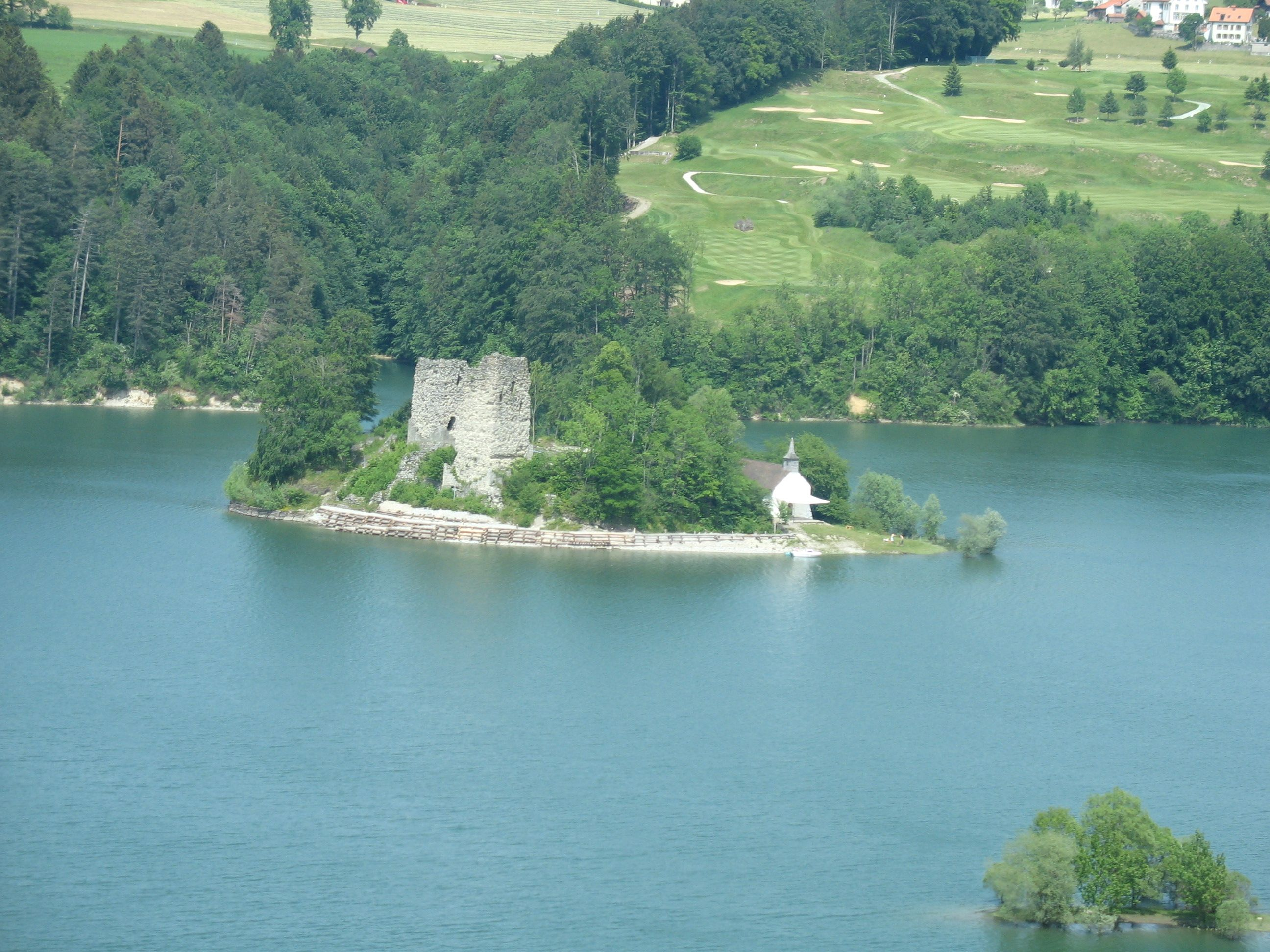 Île d'Ogoz, Lac de la Gruyère, Friburg, Switzerland